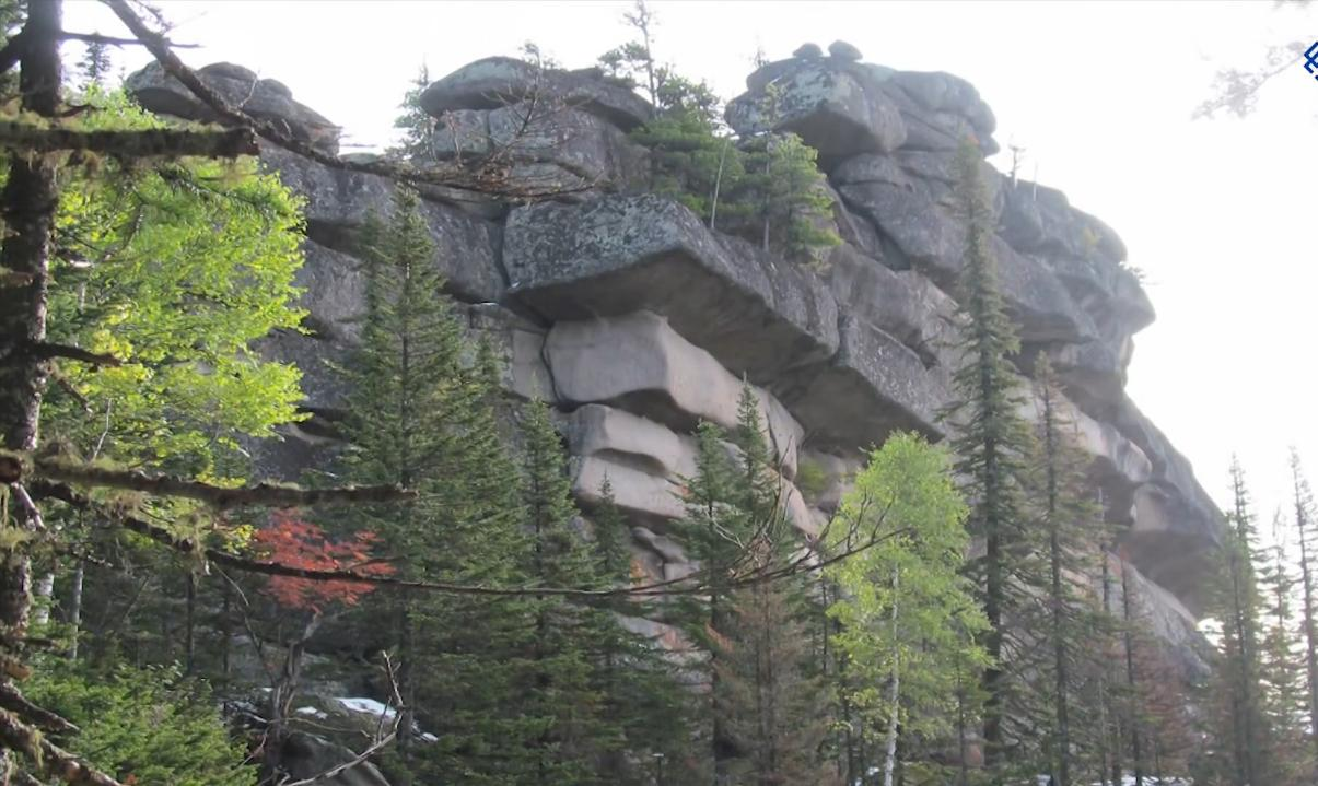 В кладке видны массивные камни с ровными краями и прямыми углами